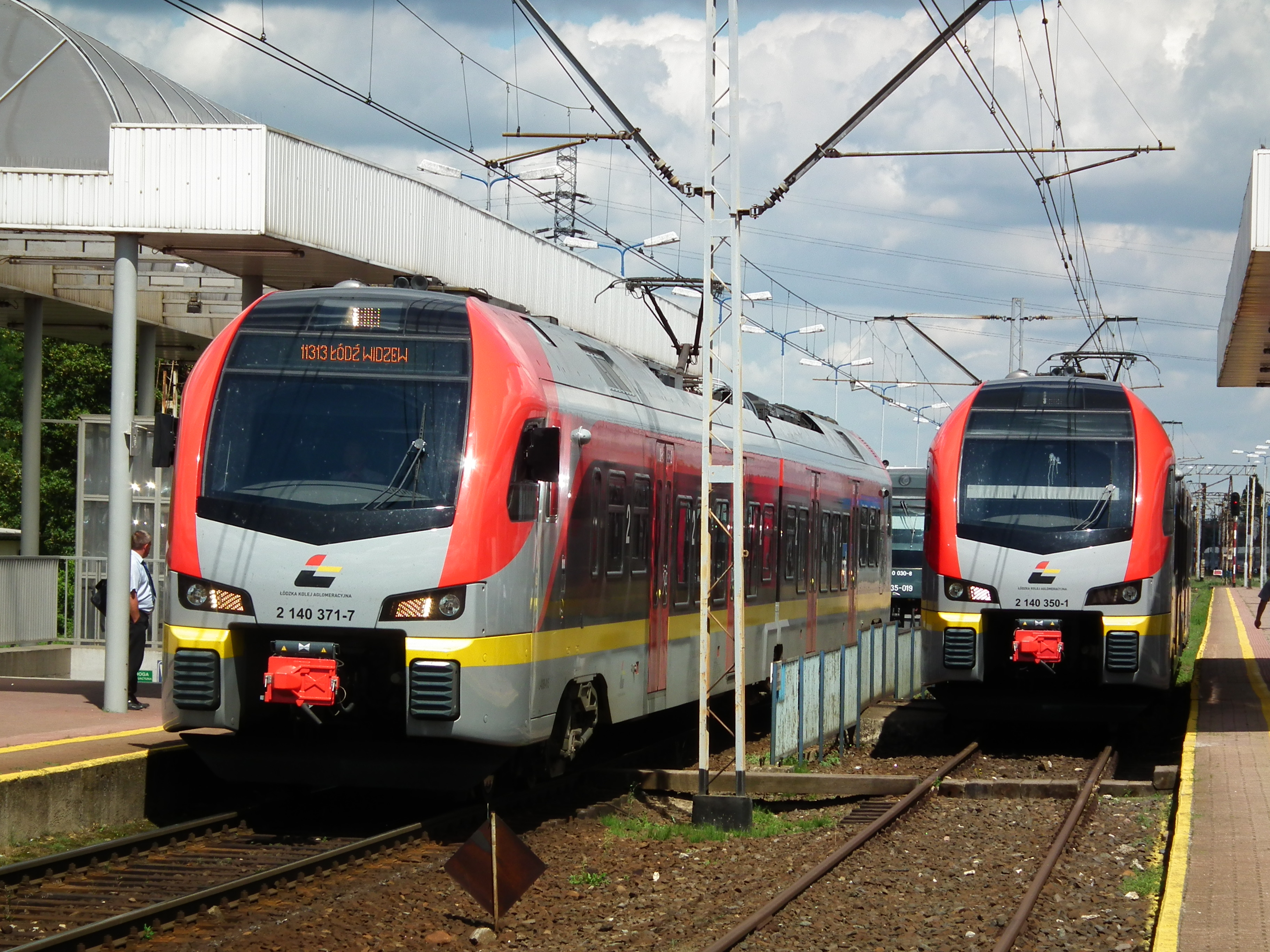 Łódź Kaliska. Pociągi Łódzkiej Kolei Aglomeracyjnej.